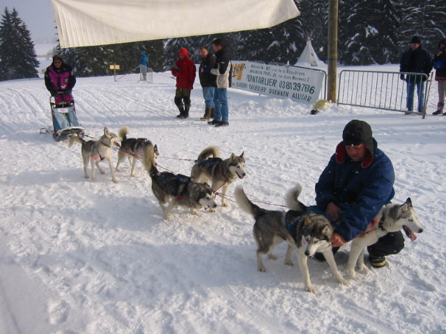 Course de Husky